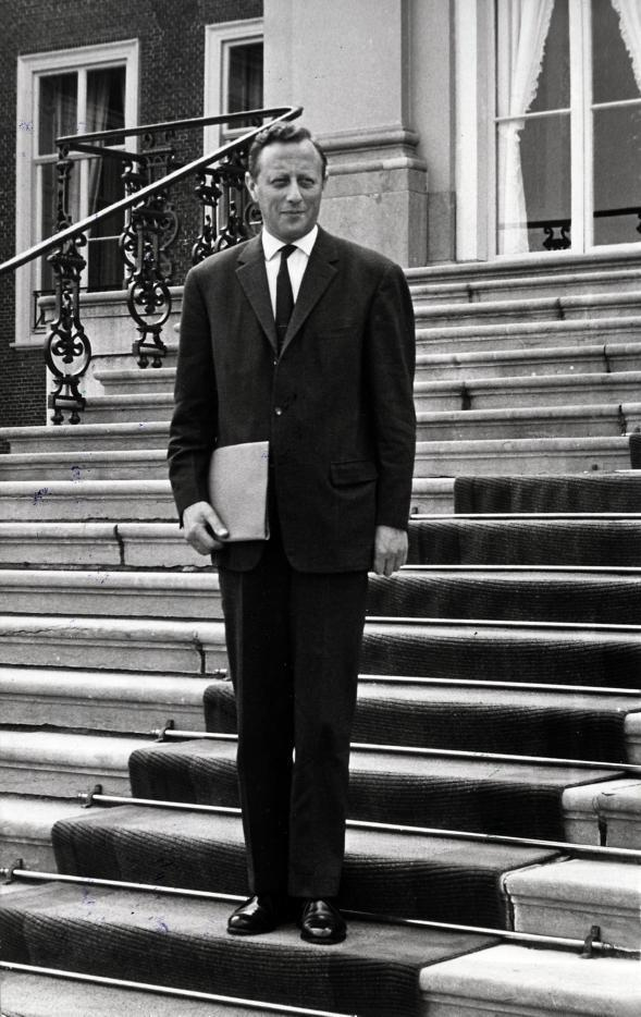 H.J. Lankhorst (PSP) op de trappen van Huis ten Bosch. Den Haag, Nederland, 18 mei 1963.